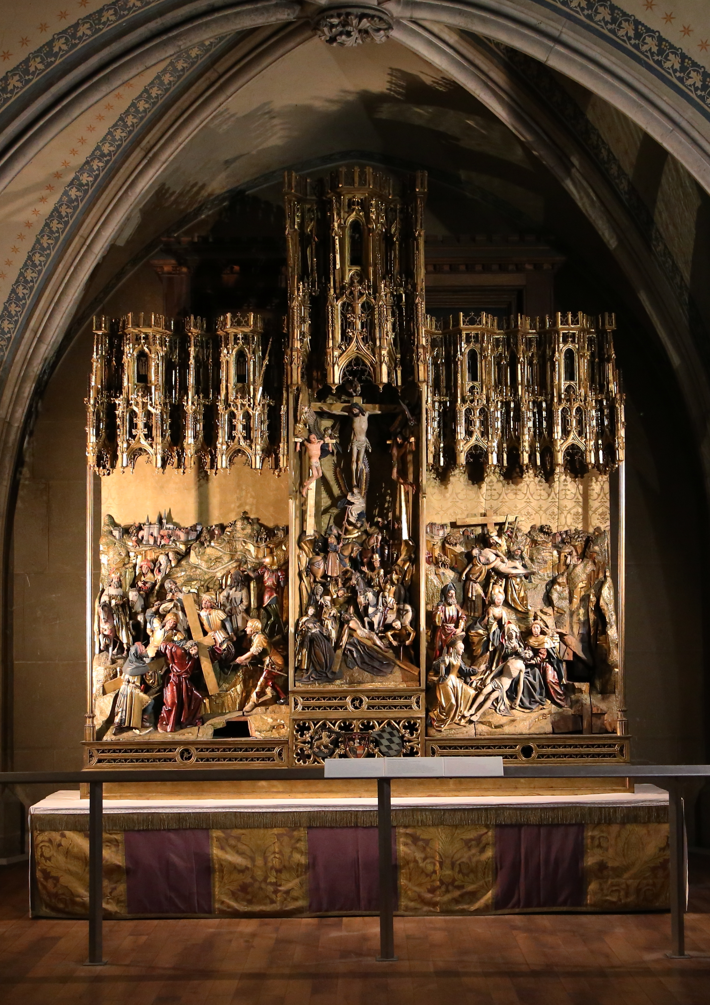 Antwerpener Altar in der Wiener Votivkirche. Eine flämische Holzschnitzarbeit aus der Mitte oder 2. Hälfte des 15. Jahrhunderts mit Passionsszenen und originaler Polychromie.